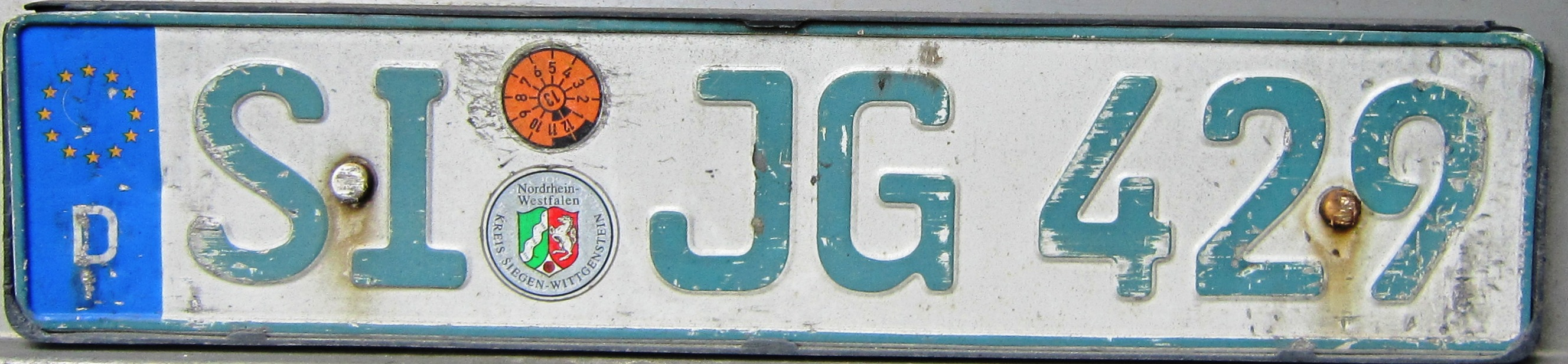 Duitsland kenteken trailer